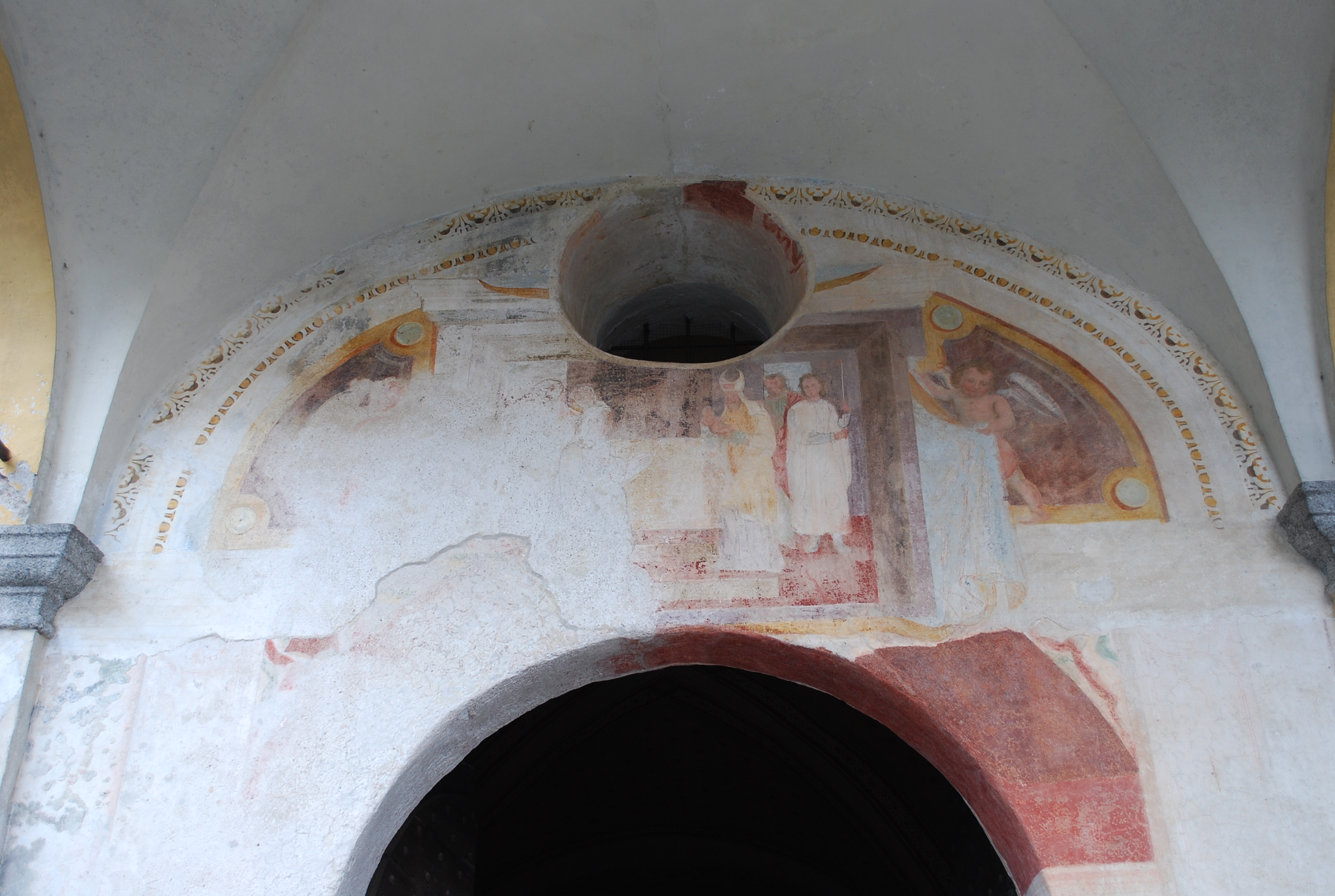 Chiesa vecchia di Santa Maria (Belgirate) - facciata